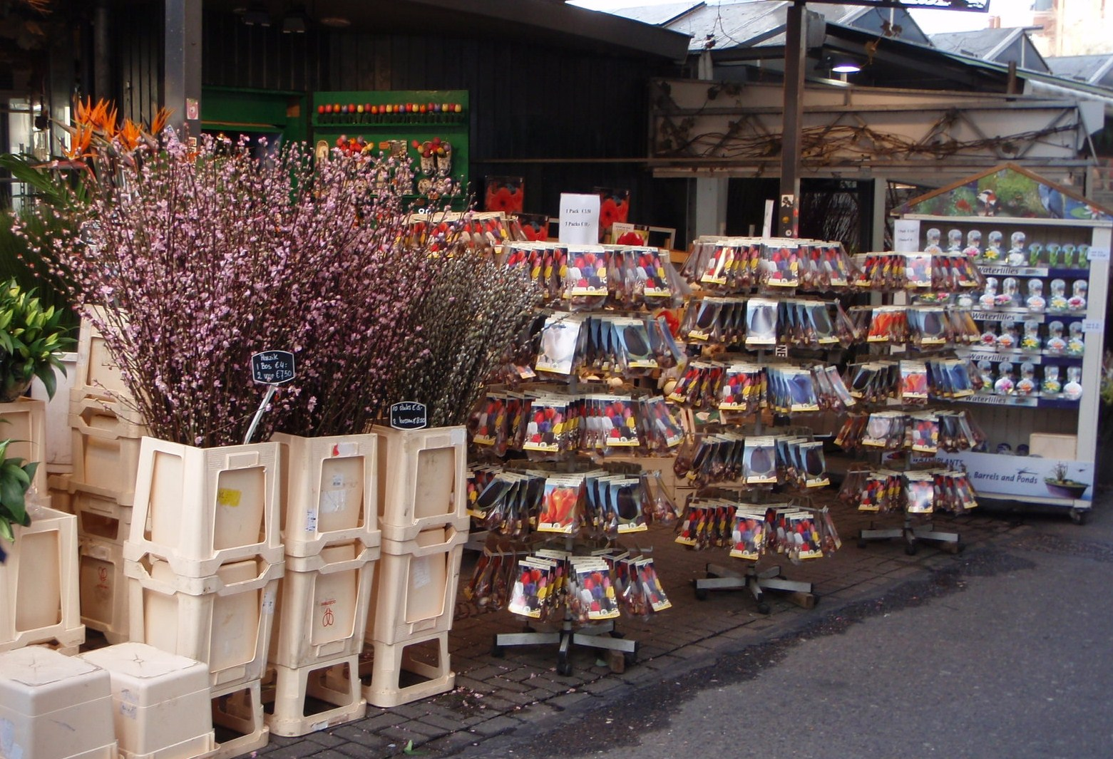 Amsterdam Bloemenmarkt 2